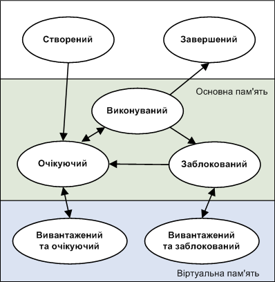 Діаграма станів процесу